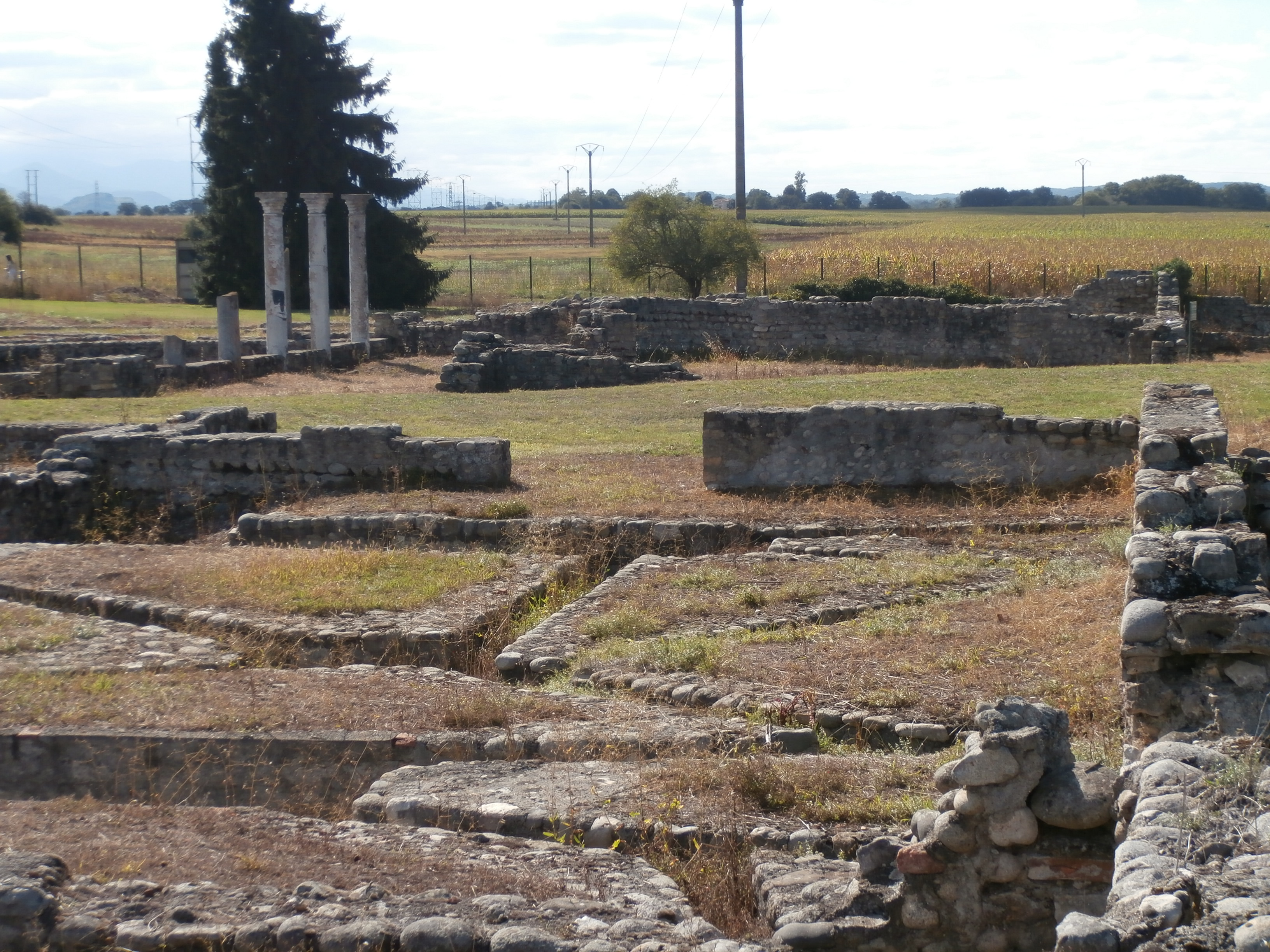 Villa gallo-romaine de Valentine, vue d'ensemble, avec Le chauffage par hypocauste en premier plan .